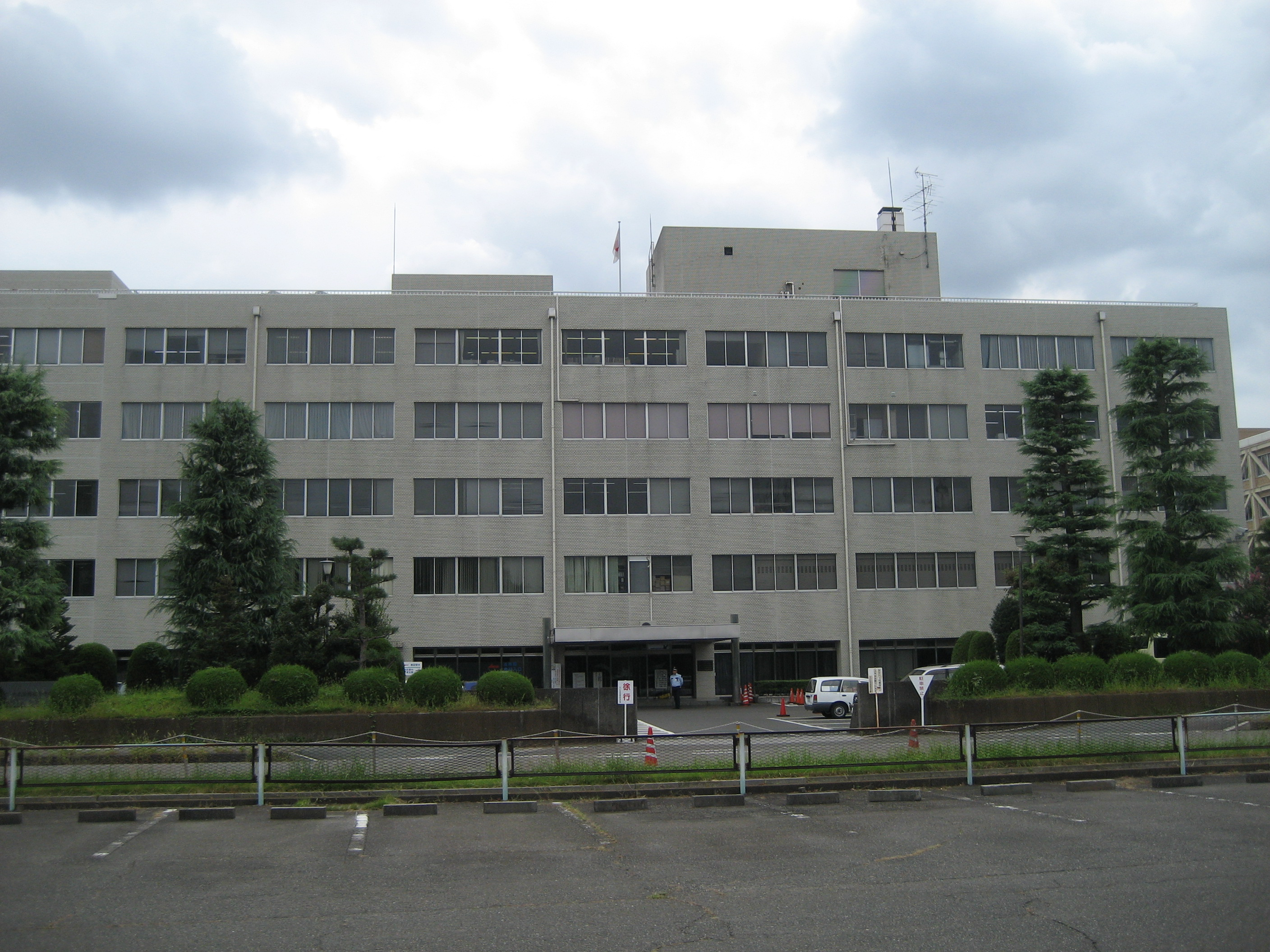 さいたま地方検察庁庁舎